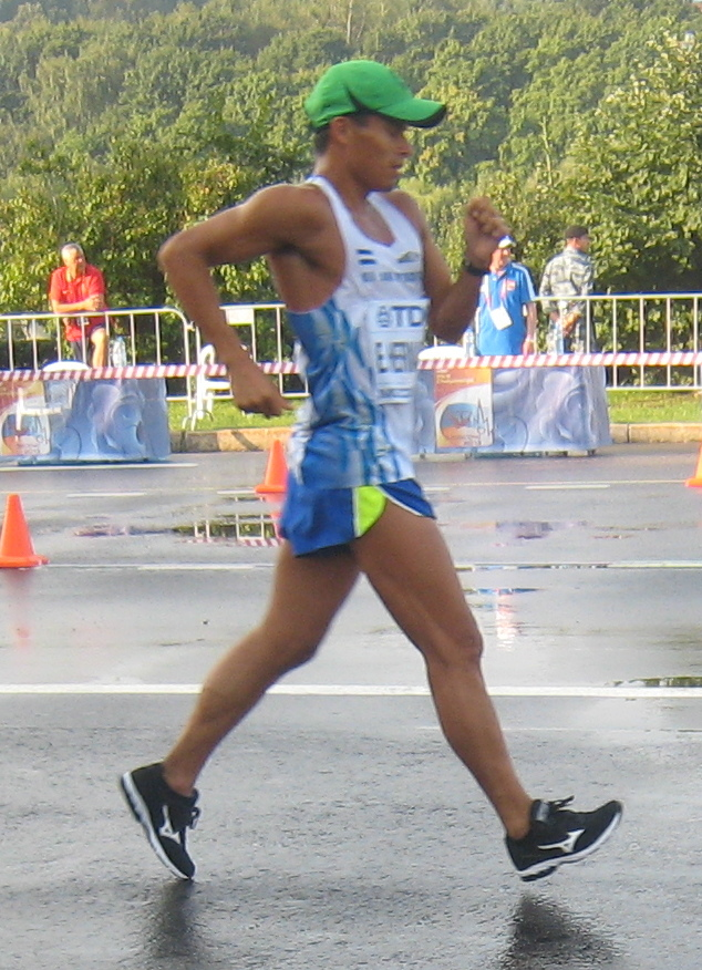 Чемпионат мира по лёгкой атлетике 2013. Ходьба 50 км, мужчины: сальвадорец Эмерсон Эрнандес